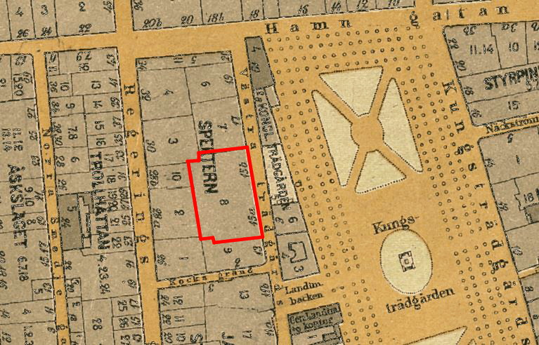 Del av "Karta ”Bladet Gustaf Adolfs torg” 1909" visande kvarteret Spektern